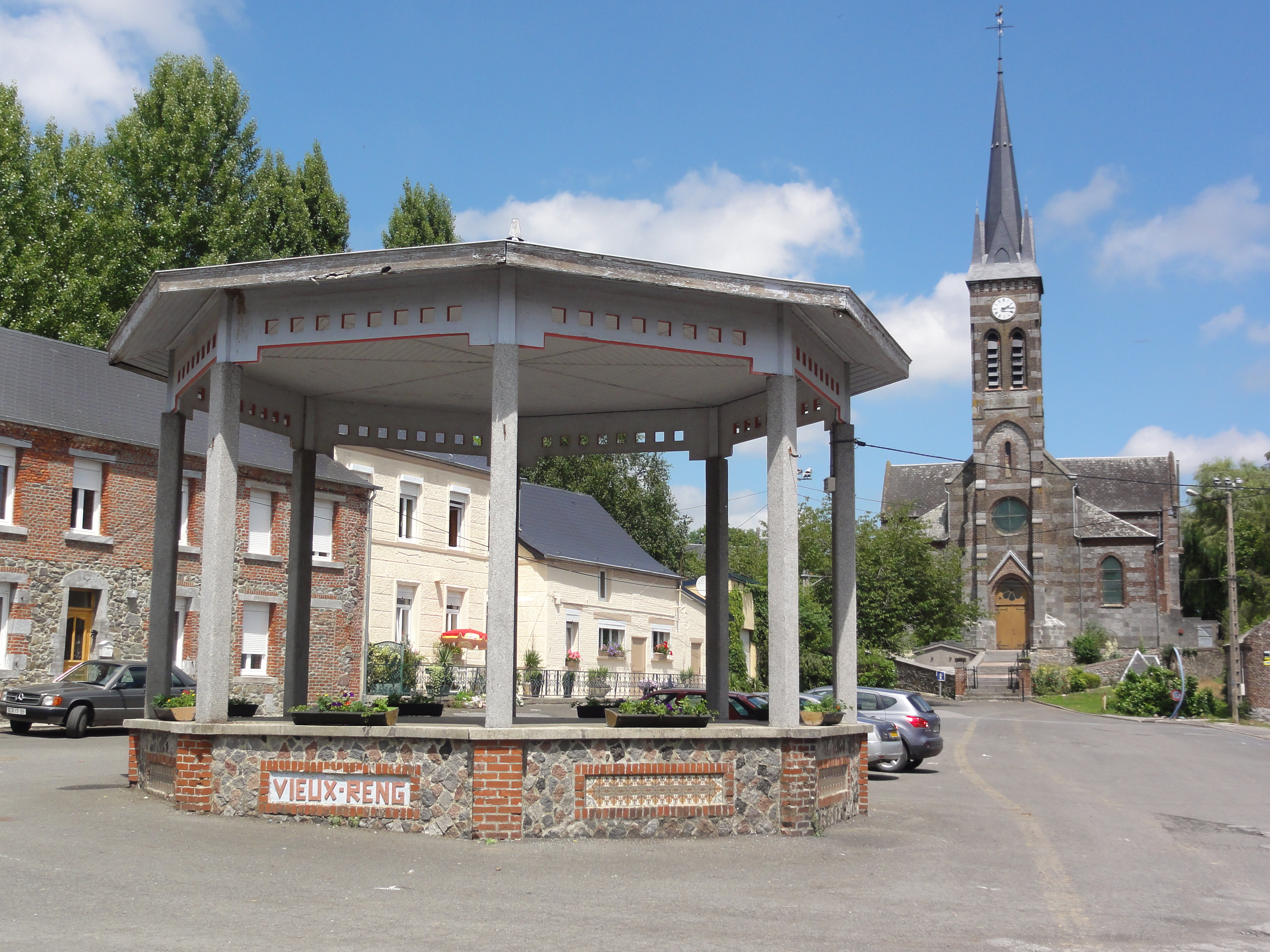 Vieux-Reng (Nord, Fr) kiosque à musique; au fond: l'église